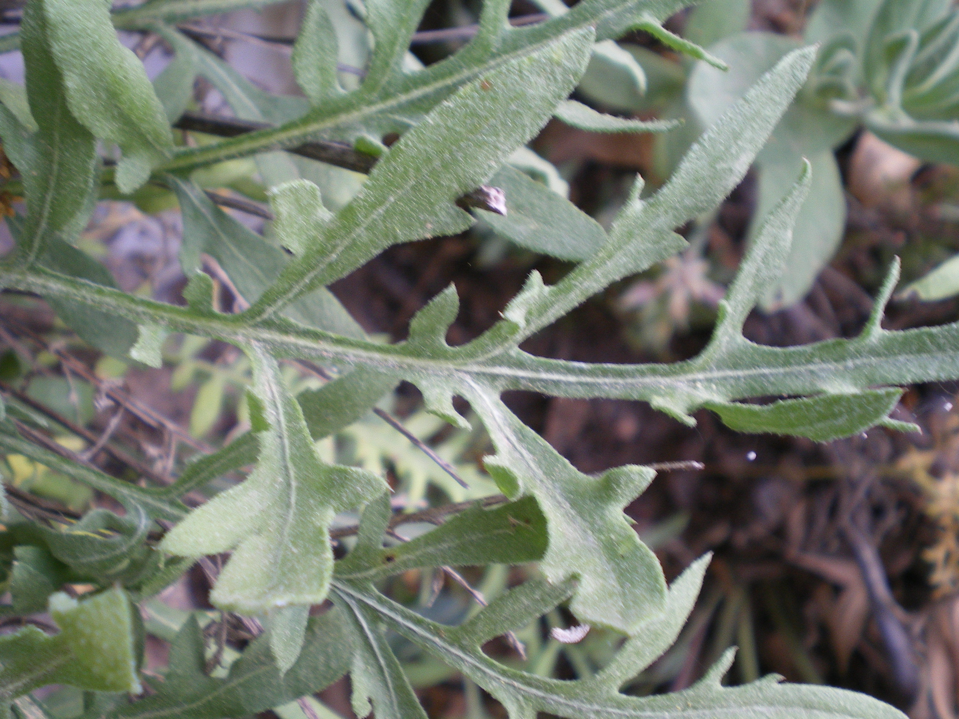 Fotografía de detalle de una hoja de Centaurea kunkelii, Sierra de Gádor, Almería, España.